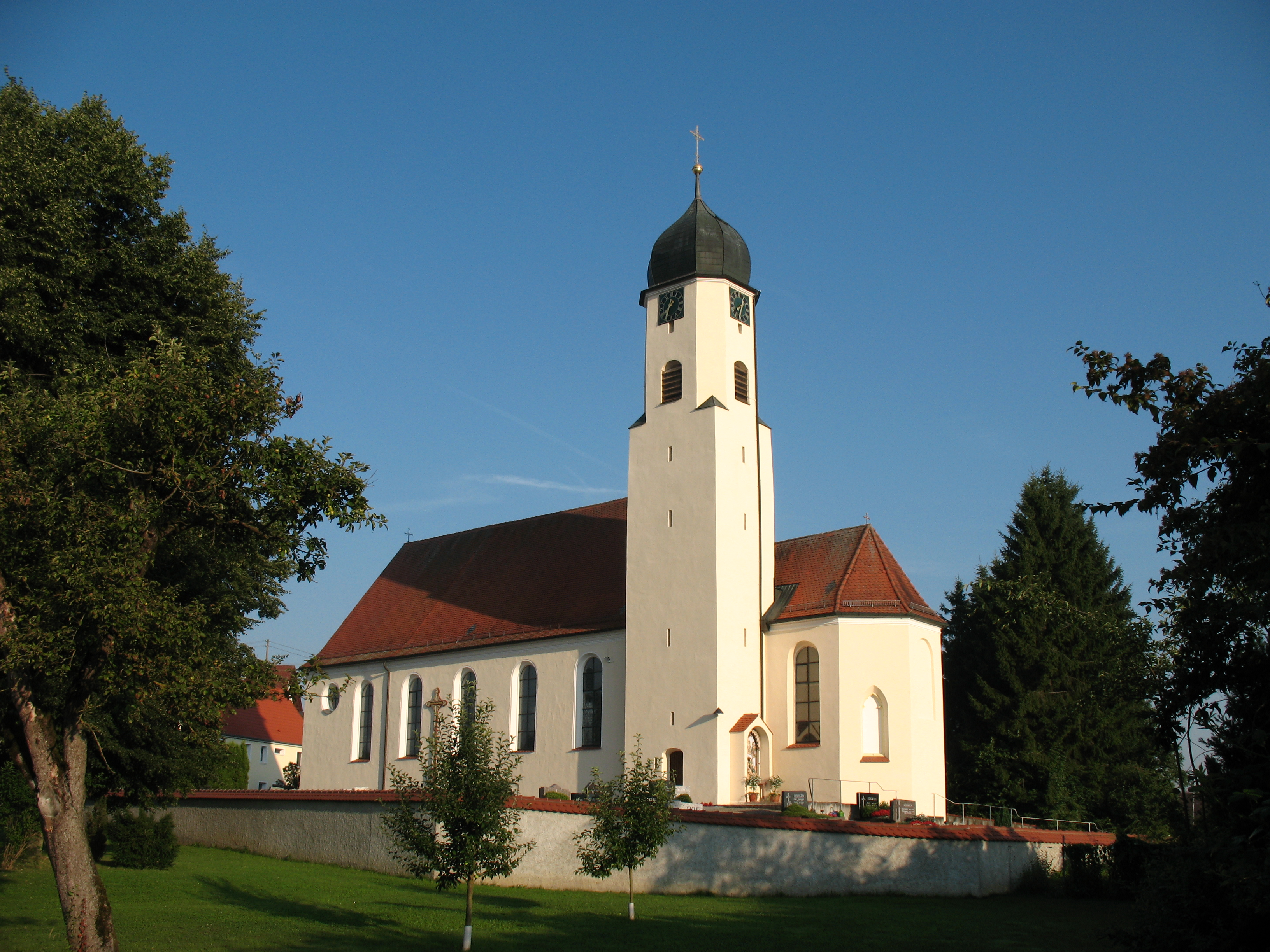 Maselheim, Kirche St. Peter und Paul von Süden.